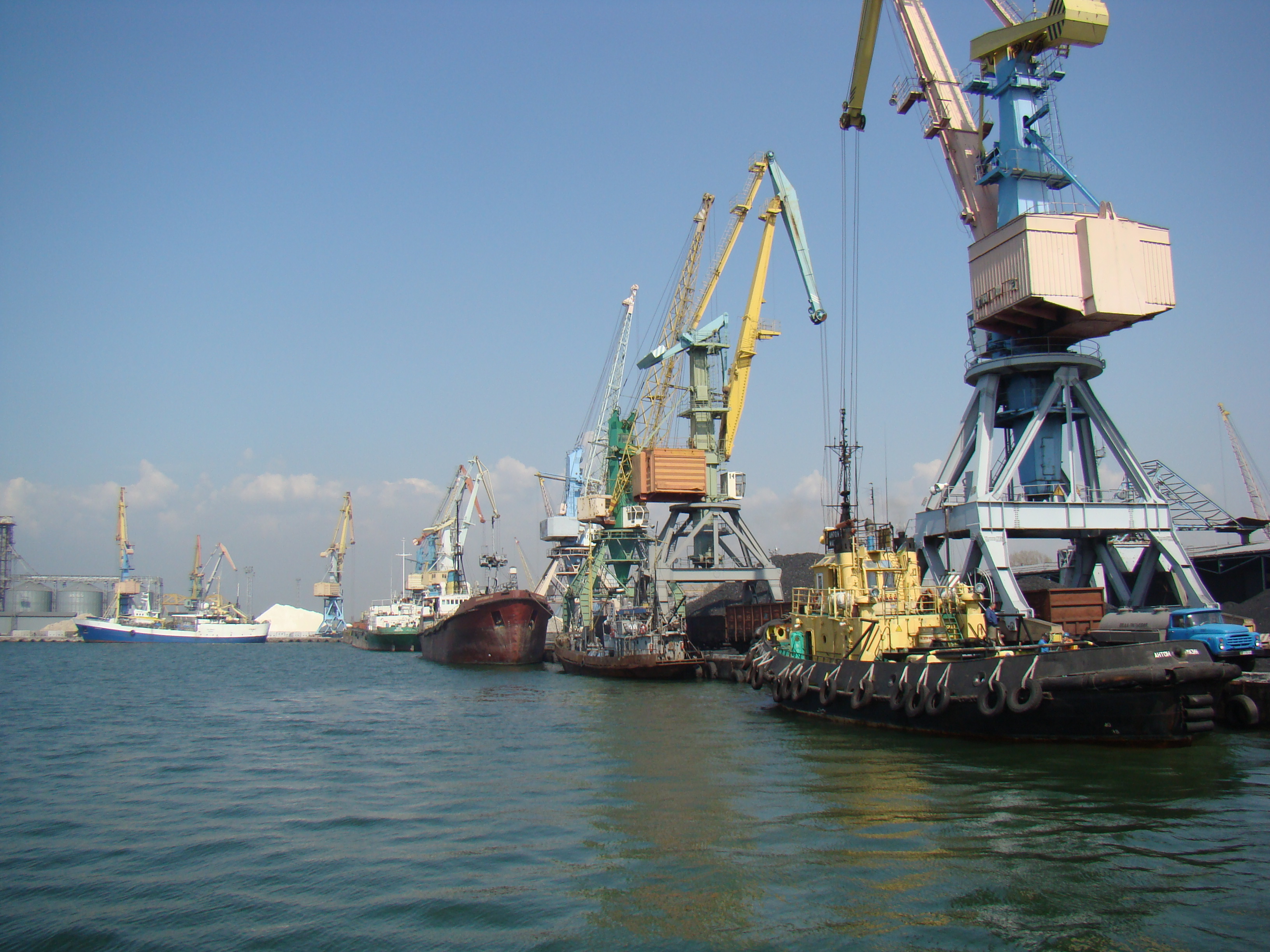 Бердянский морской торговый порт